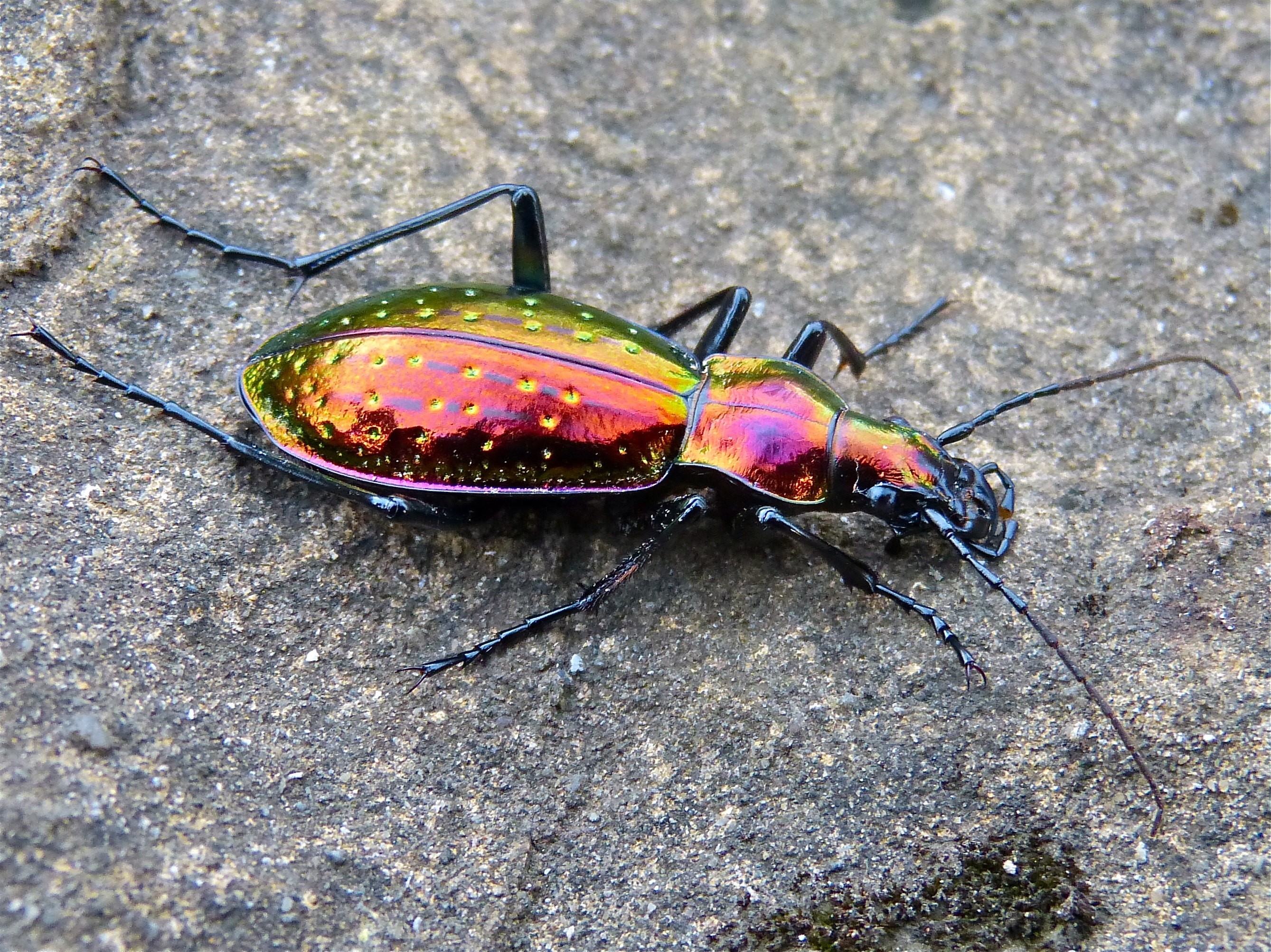 Col du Coubet, Vallfogona de Ripollès, Catalunya, SPAIN